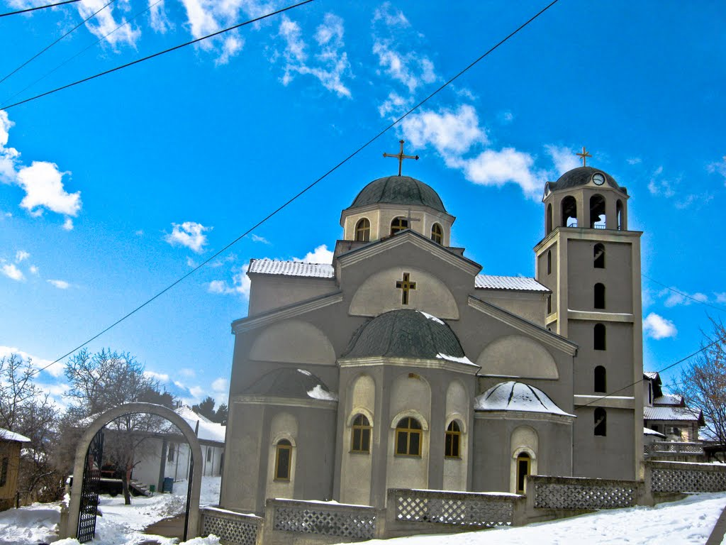 Црквата Свети Петар и Павле во Пехчево